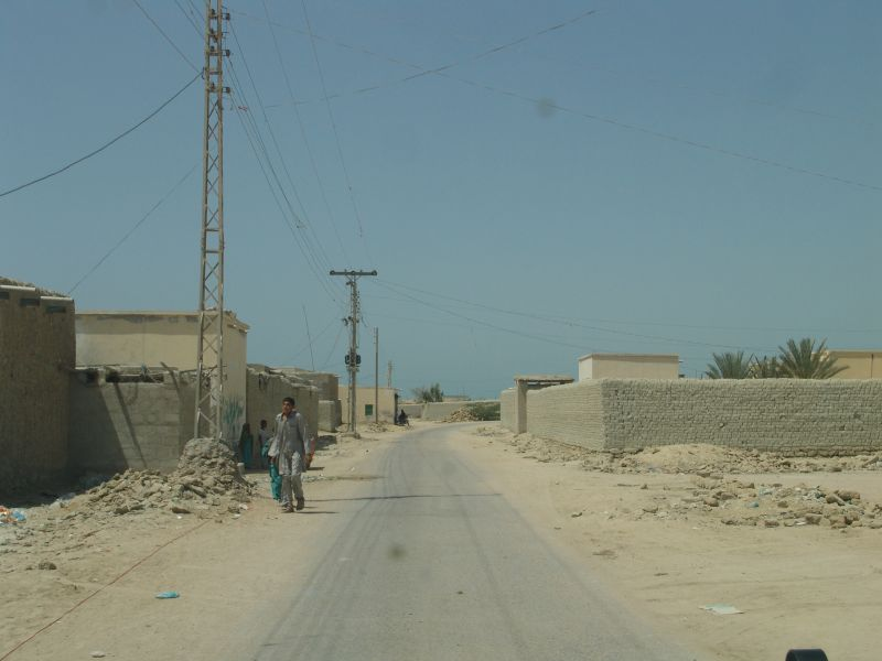 Jiwani, Balochistan, Pakistan.